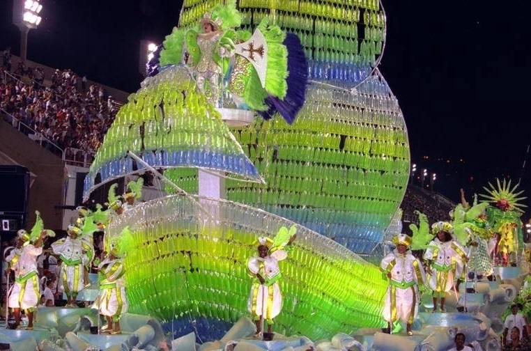 Império Serrano 2000 - Michel Filho